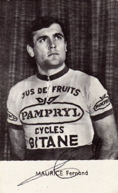 CYCLISME